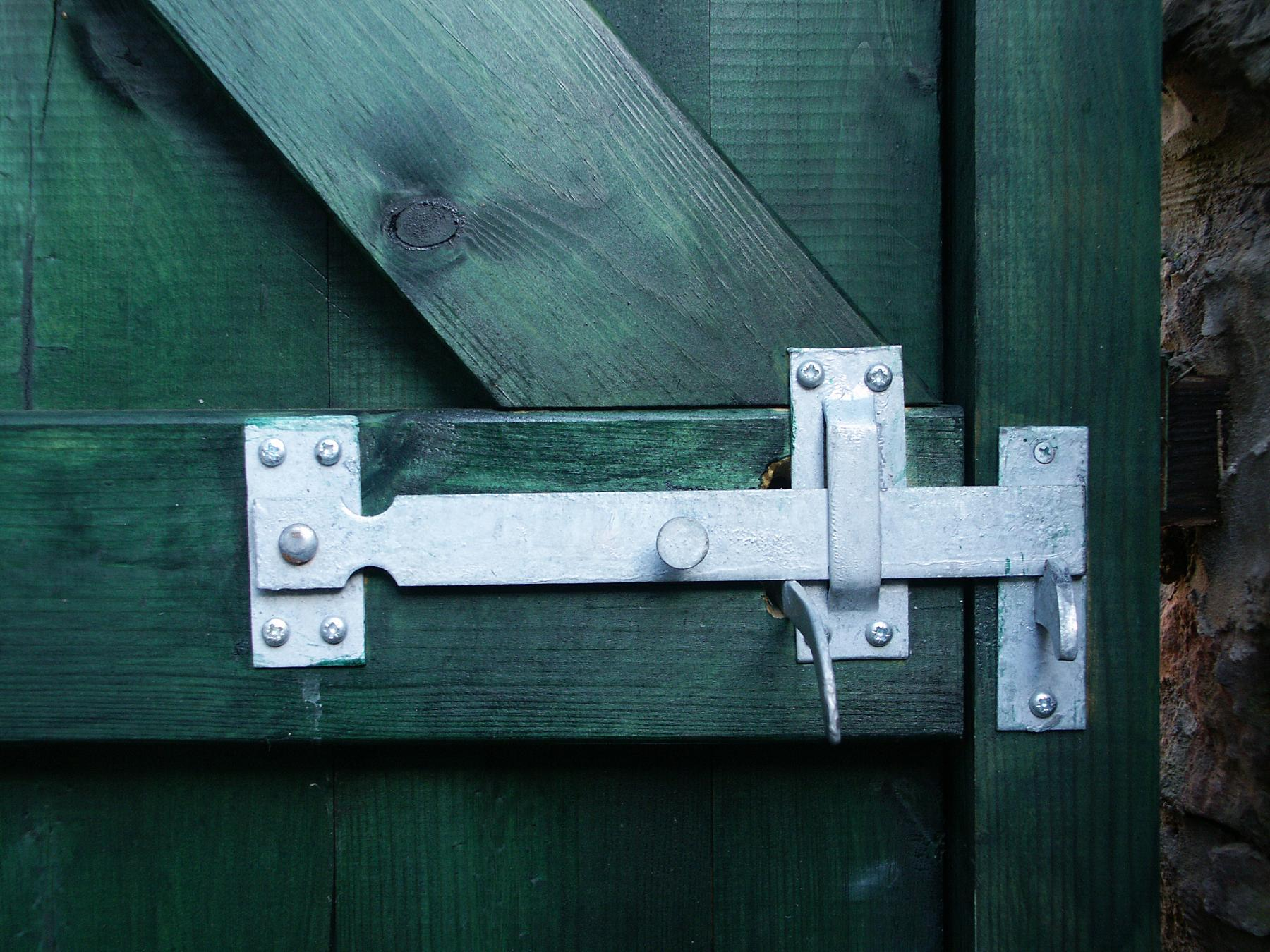 Щеколда на калиткеLatch